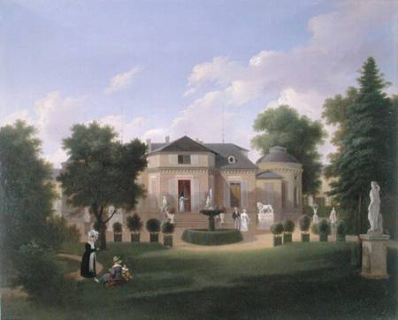 La chartreuse de la Folie Beaujon à Paris, vers 1830. Construite par Nicolas-Claude Girardin pour Nicolas Beaujon.